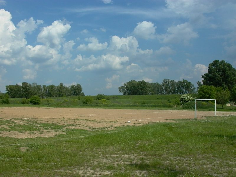 Widok ogólny pozostałości wału głównego fortu X Twierdzy Warszawa, od strony Trasy Siekierkowskiej